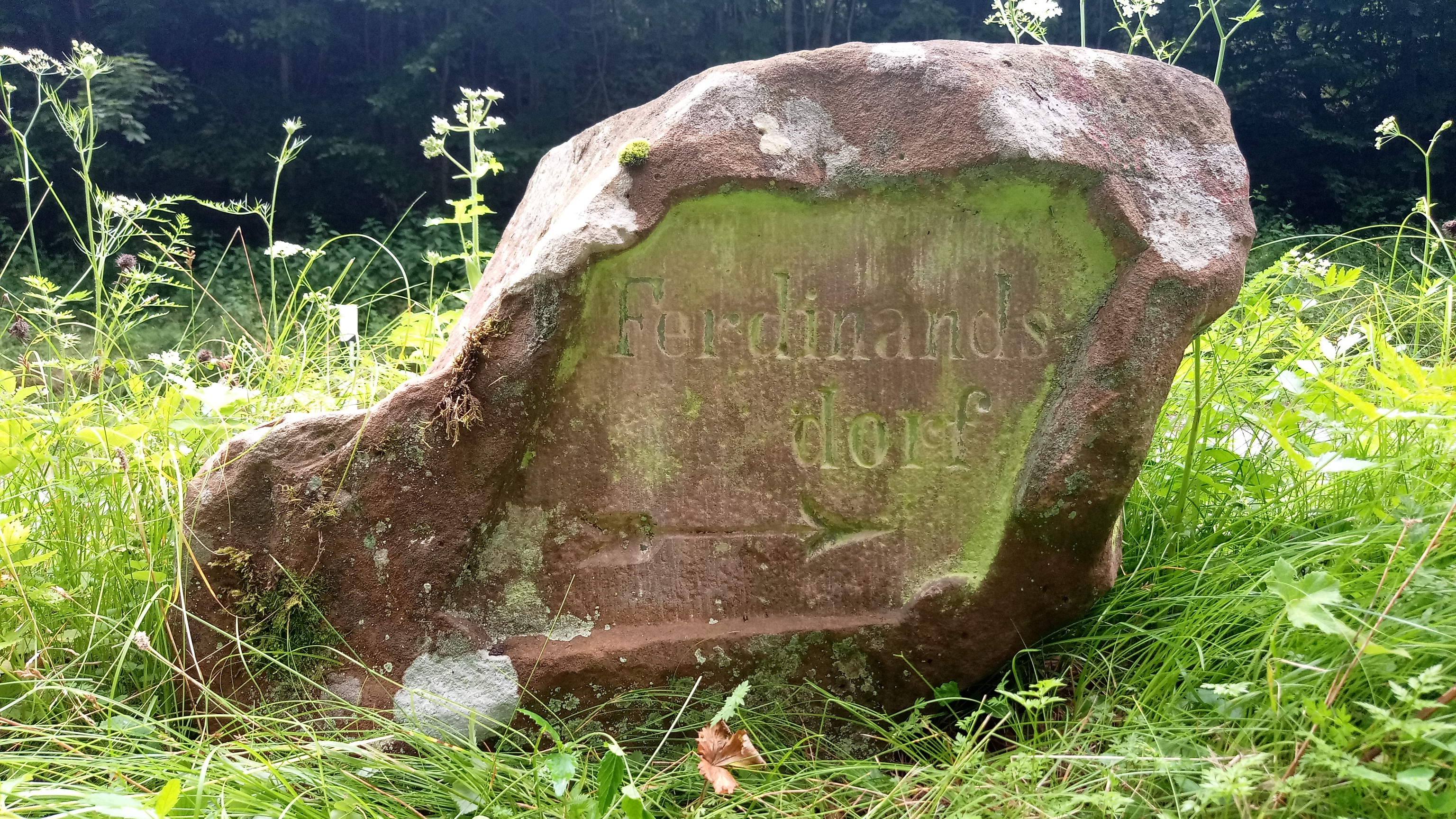 Wegweiserstein an der alten Wegegabelung Reisenbach-Ferdinandsdorf. Ferdinandsdorf (Baden) wurde um 1850 aufgrund fehlender wirtschaftlicher Grundlage aufgelöst. Etwa ein Drittel der Bevölkerung durfte auf Staatskosten nach Amerika auswandern. Es sind noch ein paar Ruinen und viele Mauerreste zu finden.